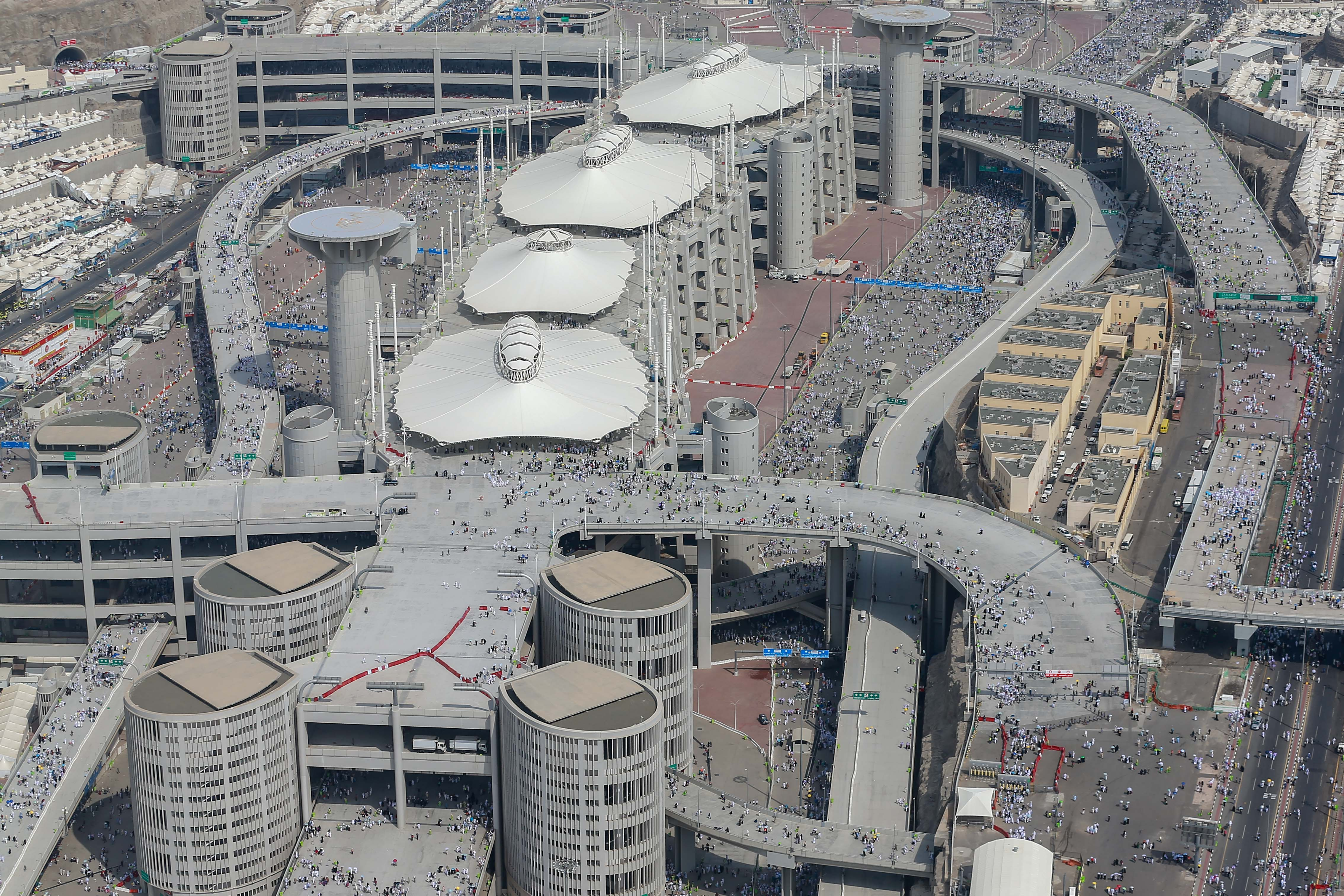 جسر الجمرات